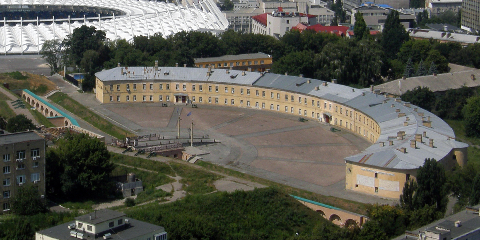 Северная полубашня Госпитального замка Киевской крепости